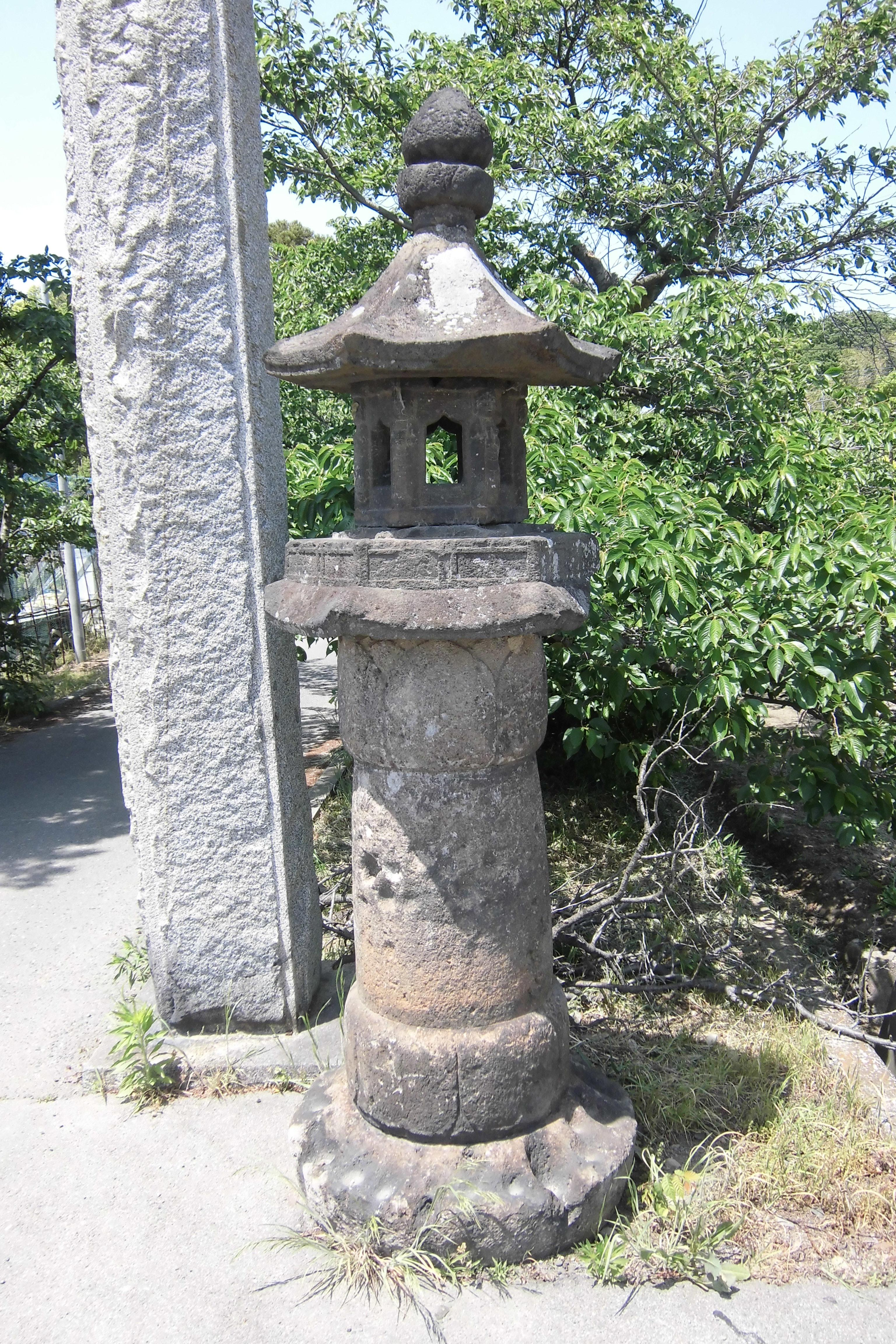 慈照寺（山梨県甲斐市）六地蔵石幢